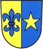 Blazono de la komunumo Vilters-Wangs, Kantono Sankt-Galo